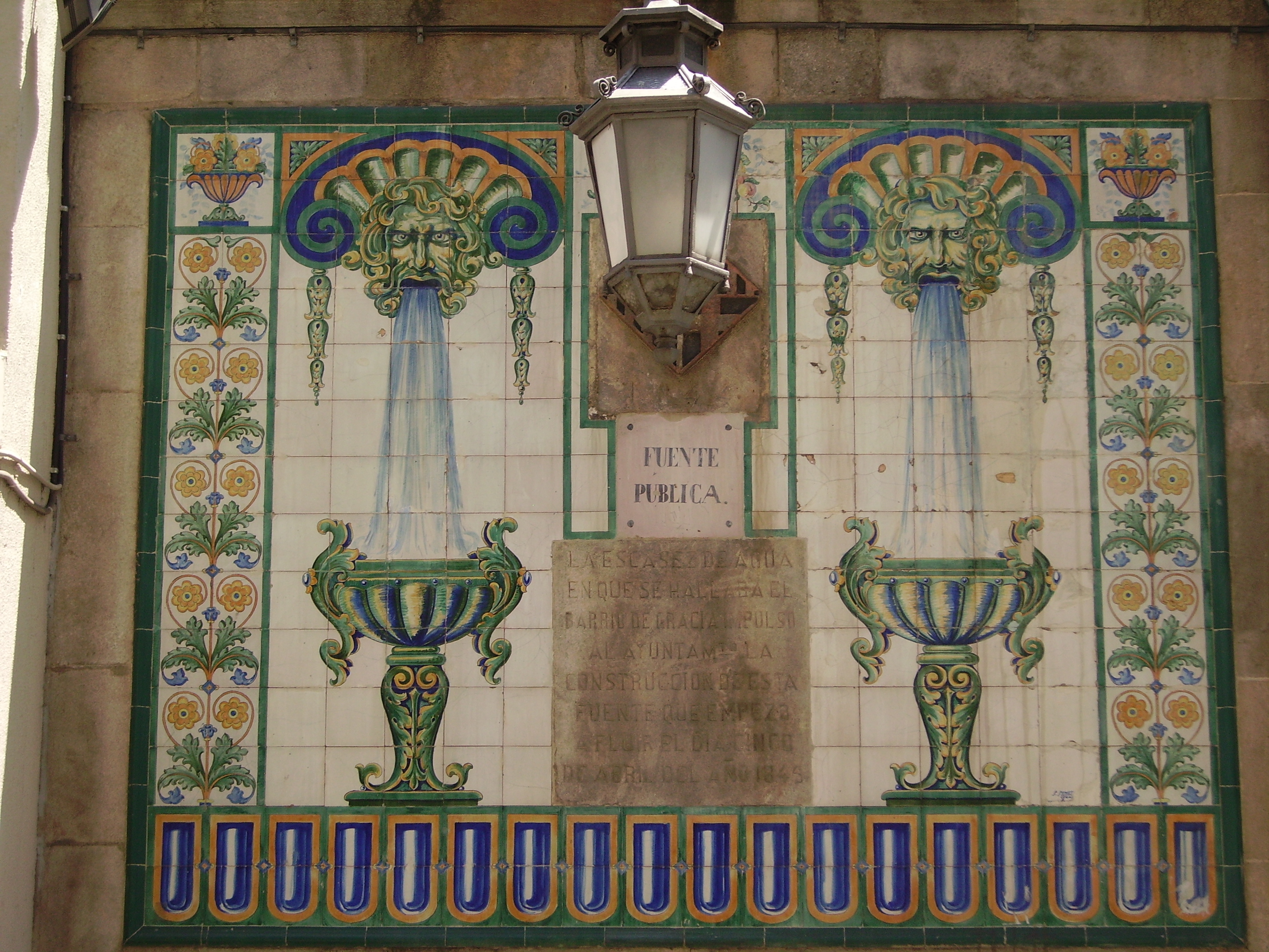 Cuadro de cerámica catalana realizado en 1881 por Salvador Sunet Urgellès, ubicado en la Font de la Travessera, Travessera de Gràcia,126 Barcelona